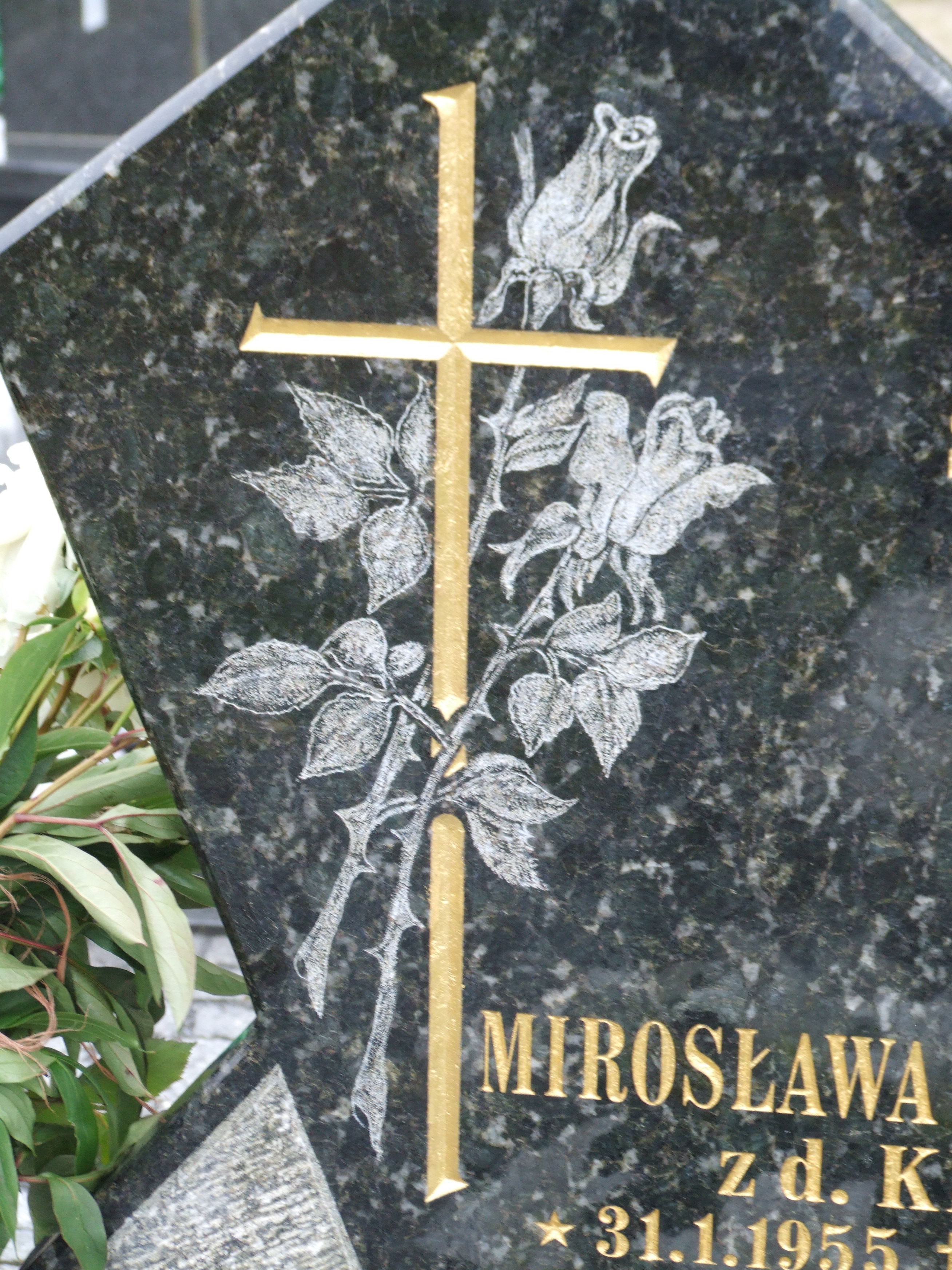 Gdynia-Oksywie Cmentarz Marynarki Wojennej